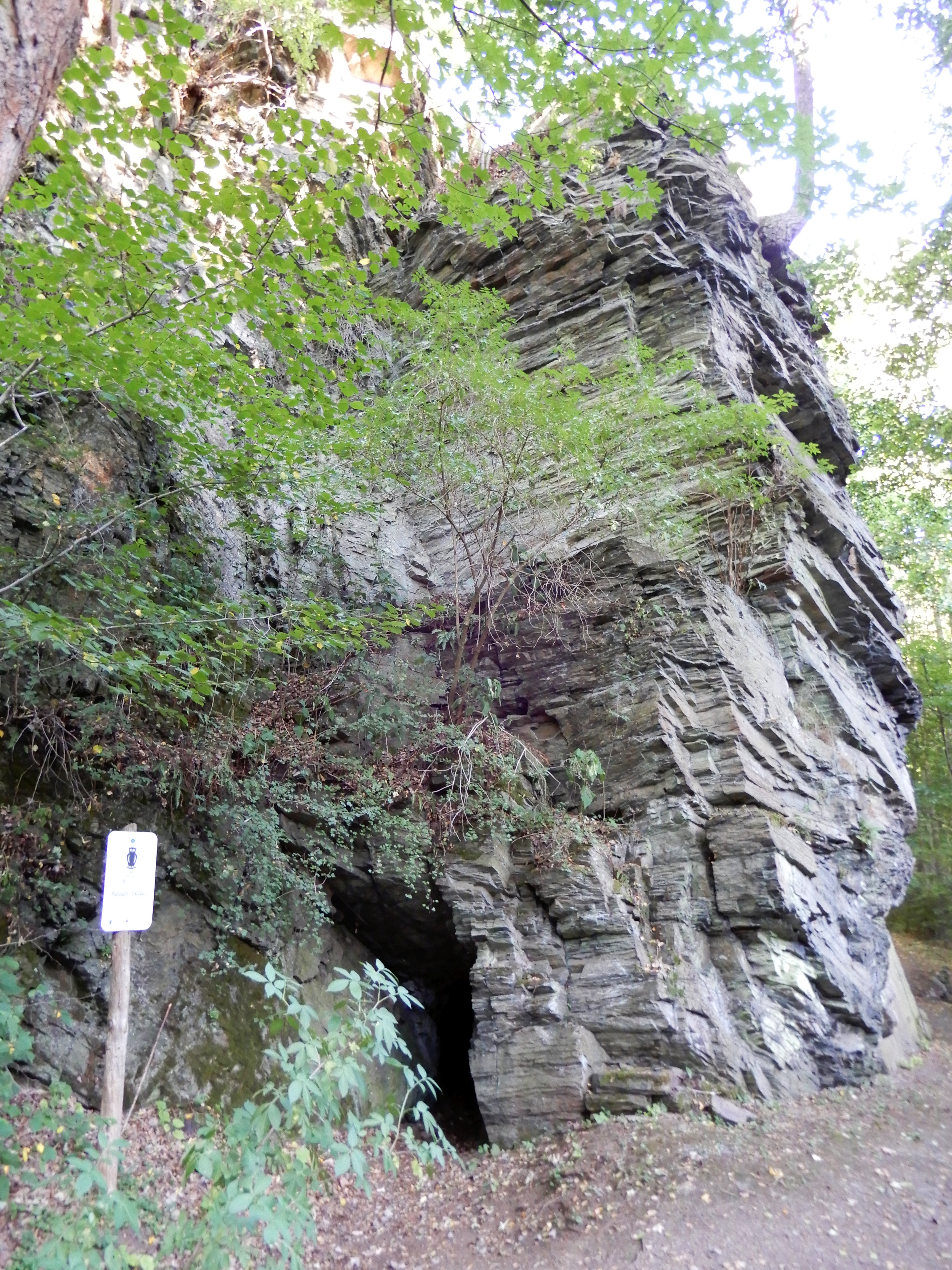 Adolphfelsen an der Kügelgenpromenade bei Alexisbad